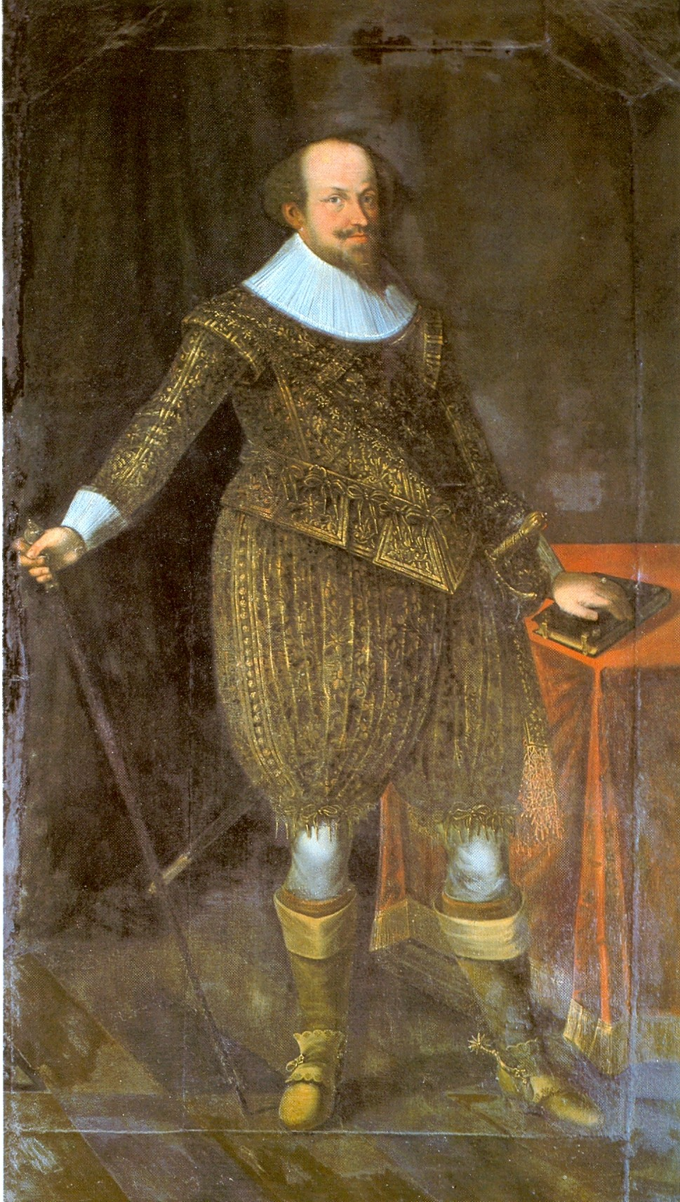 Herzog Johann Friedrich (1582-1628))